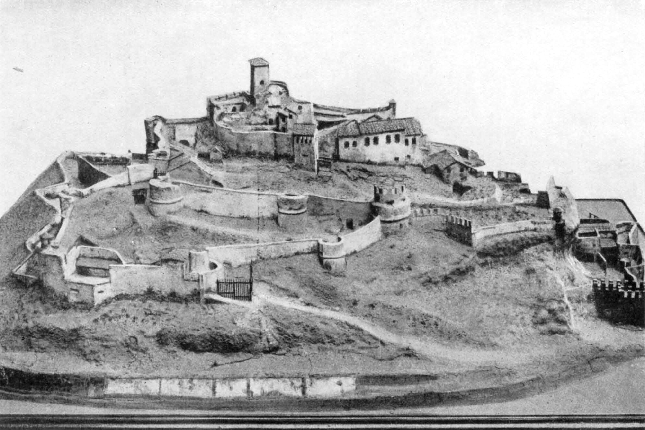 rocca d'Arona, plastico esistente all'Isolabella